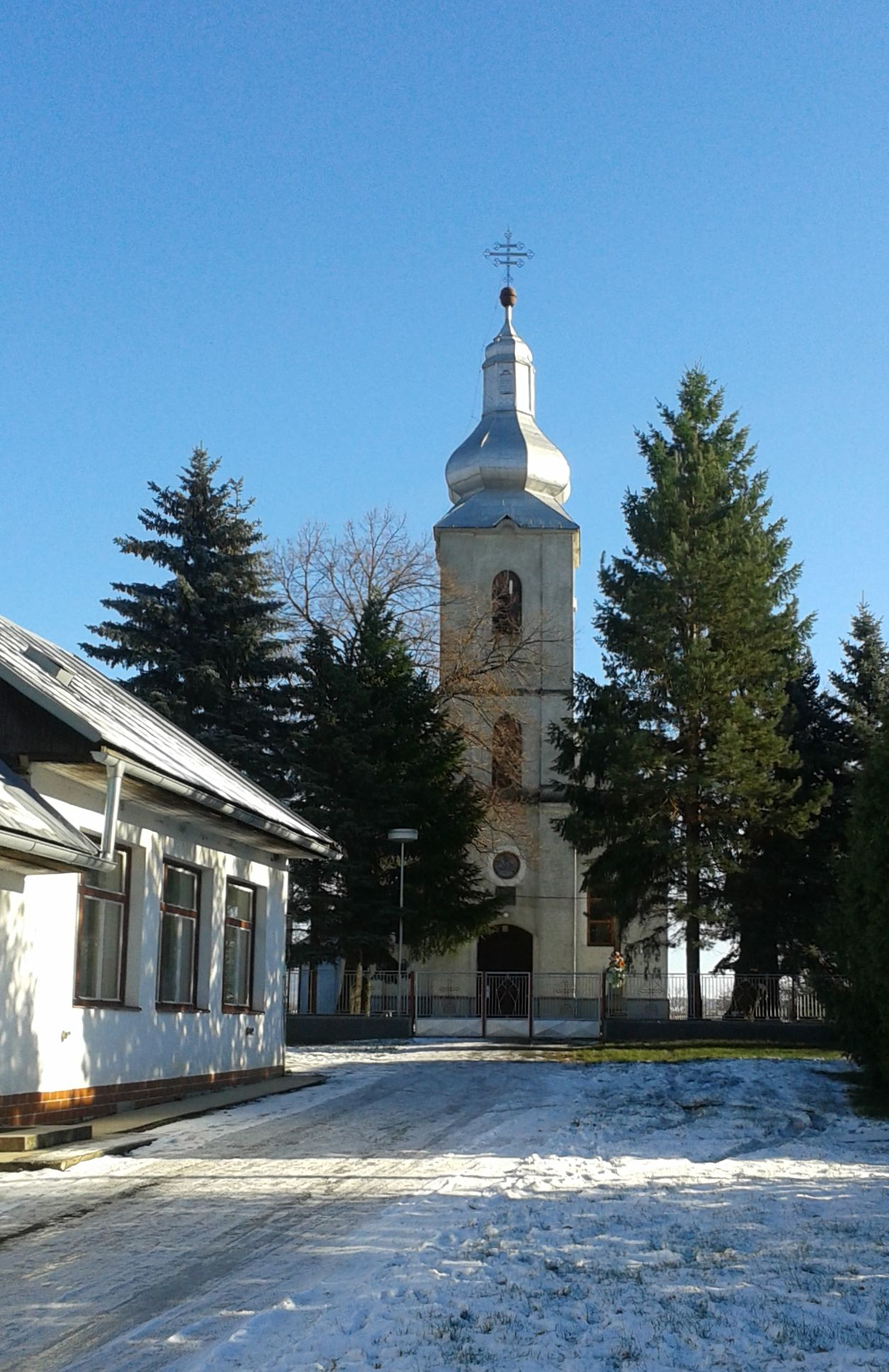 Gréckokatolícky kostol Nanebovstúpenia Panny Márie v obci Horňa, okres Sobrance